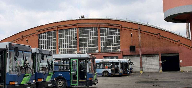 Hamzsabégi autóbuszgarázs